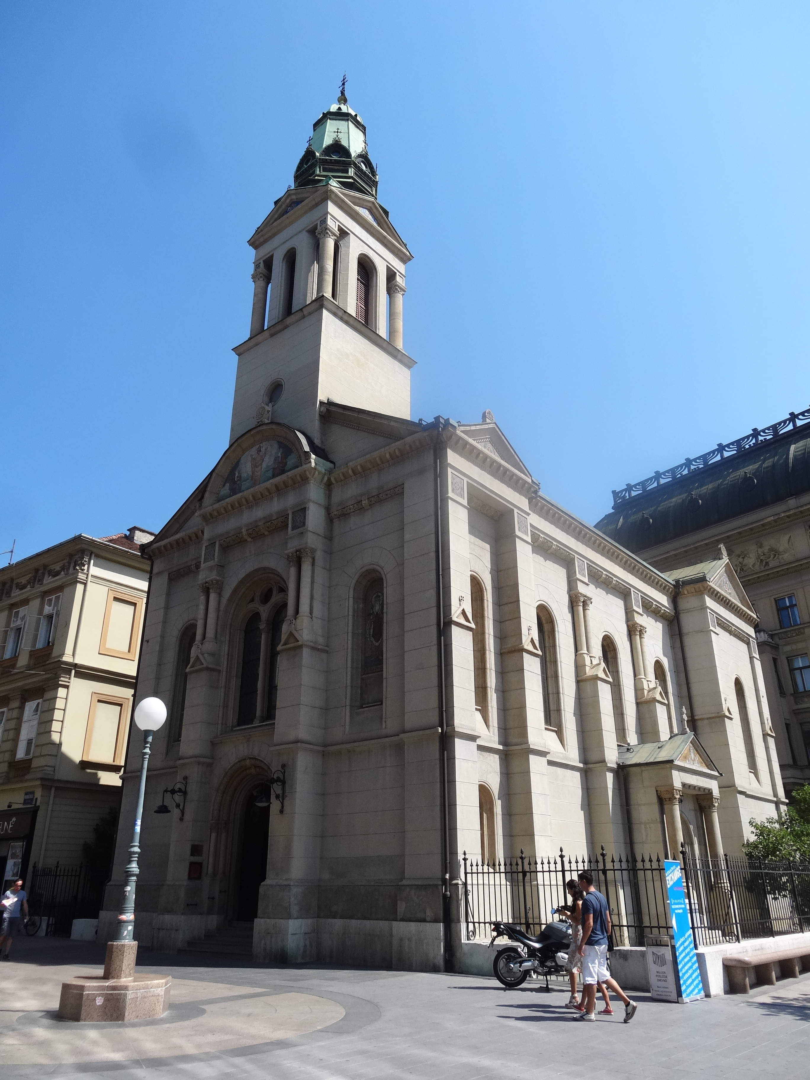 Zagreb, Croàcia (agost 2013)